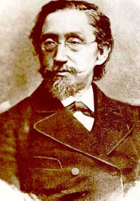 Poór Imre bőrgyógyász, egyetemi tanár, királyi tanácsos, az MTA levelező tagja, 1823 – 1897.